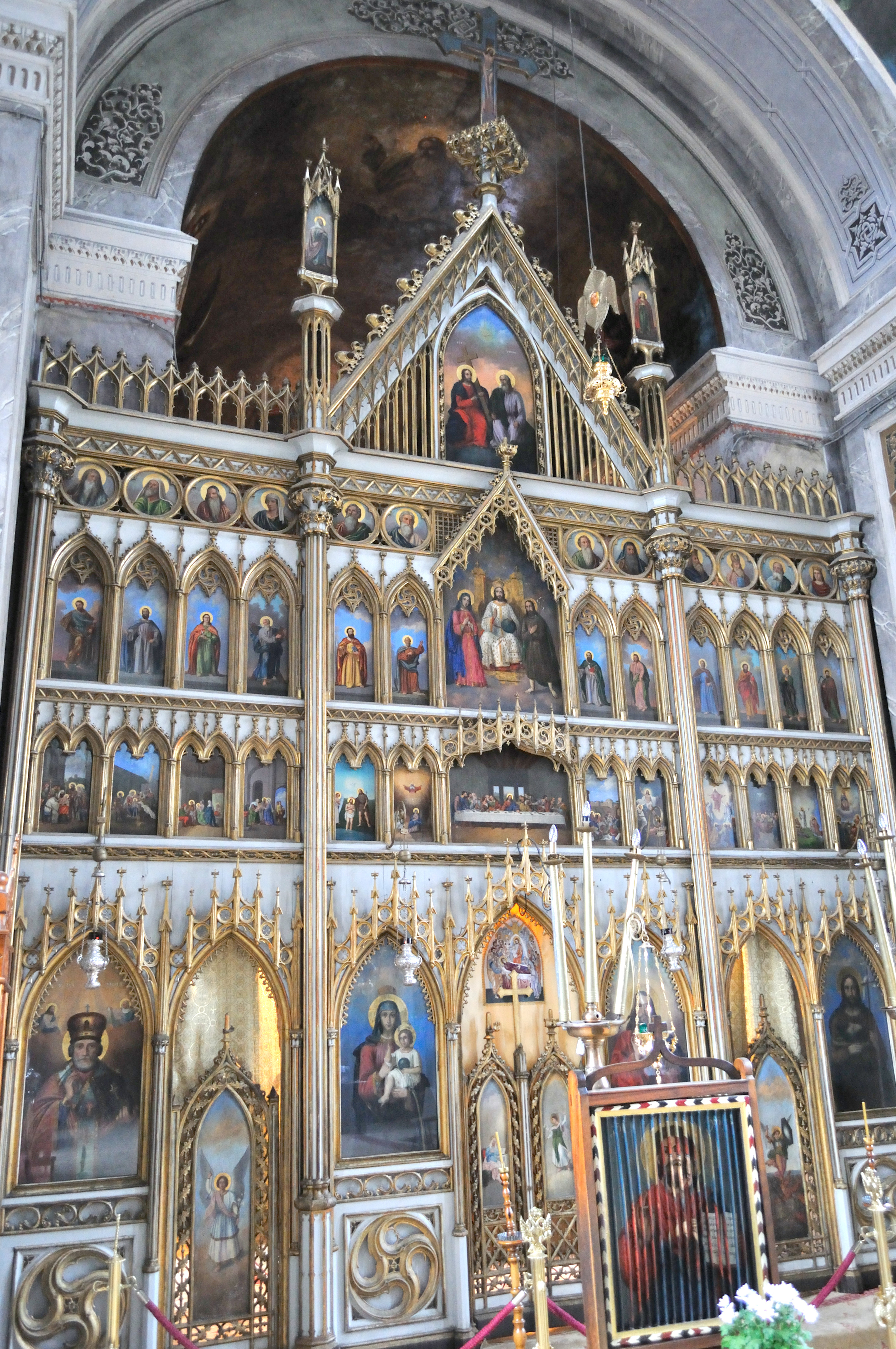 Mănăstirea Bistriţa